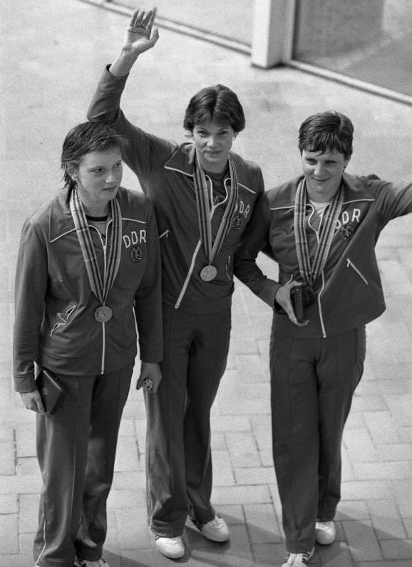 Moskau, Olympiade, Siegerinnen über 200 m Rücken ADN-ZB/Kluge/27.7.80/ Moskau: Olympia/ Erneut dreifacher DDR-Erfolg/ Ihre dritte Golmedaille holte sich Rica Reinisch (DDR/M.), die die 200 m Rücken in der neuen Weltrekordzeit von 2:11,77 min. vor Cornelia Polit (l./Silber) und Birgit Treiber (r./Bronze) für sich entschied. Die 15jährige Siegerin vom SV Einhait Dresden holte sich bereits mit der 4 x 100-m-Lagenstaffel und über 100 m Rücken Gold.Moskau, Olympiade. Abgebildete Personen: Reinisch, Rica: Schwimmerin, Olympiateilnehmerin 1980, DDR Treiber, Birgit: Schwimmerin, SC Einheit Dresden, Olympiade 1976 und 1980, DDR Polit, Cornelia: Schwimmerin, Olympiateilnehmerin 1980, DDR